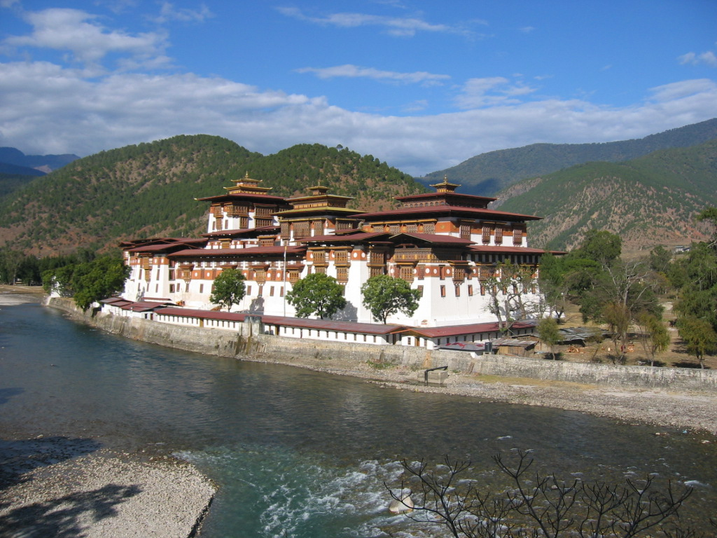 van Chinese wikipedia Image:Punakha.jpg